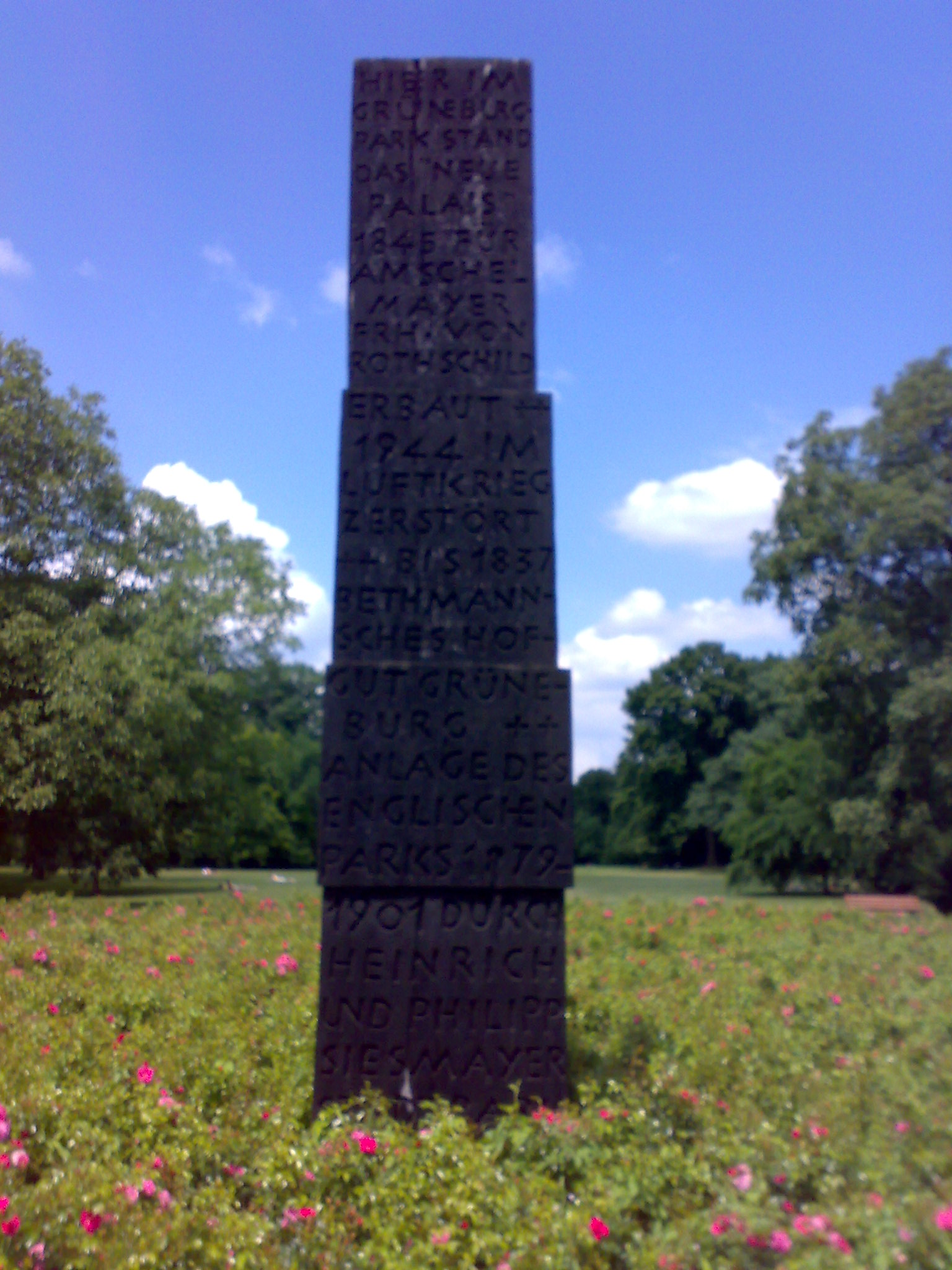 Frankfurt am Main, Grüneburgpark, Gedenkstele 1978 von Hans Steinbrenner auf der Mittelterrasse im Grüneburgpark errichtet. Die 5 Meter hohe Stele aus afrikanischem "Cabala"-Holz erinnert an das "Neue Palais" von Amschel Mayer Freiherr von Rothschild (1845)